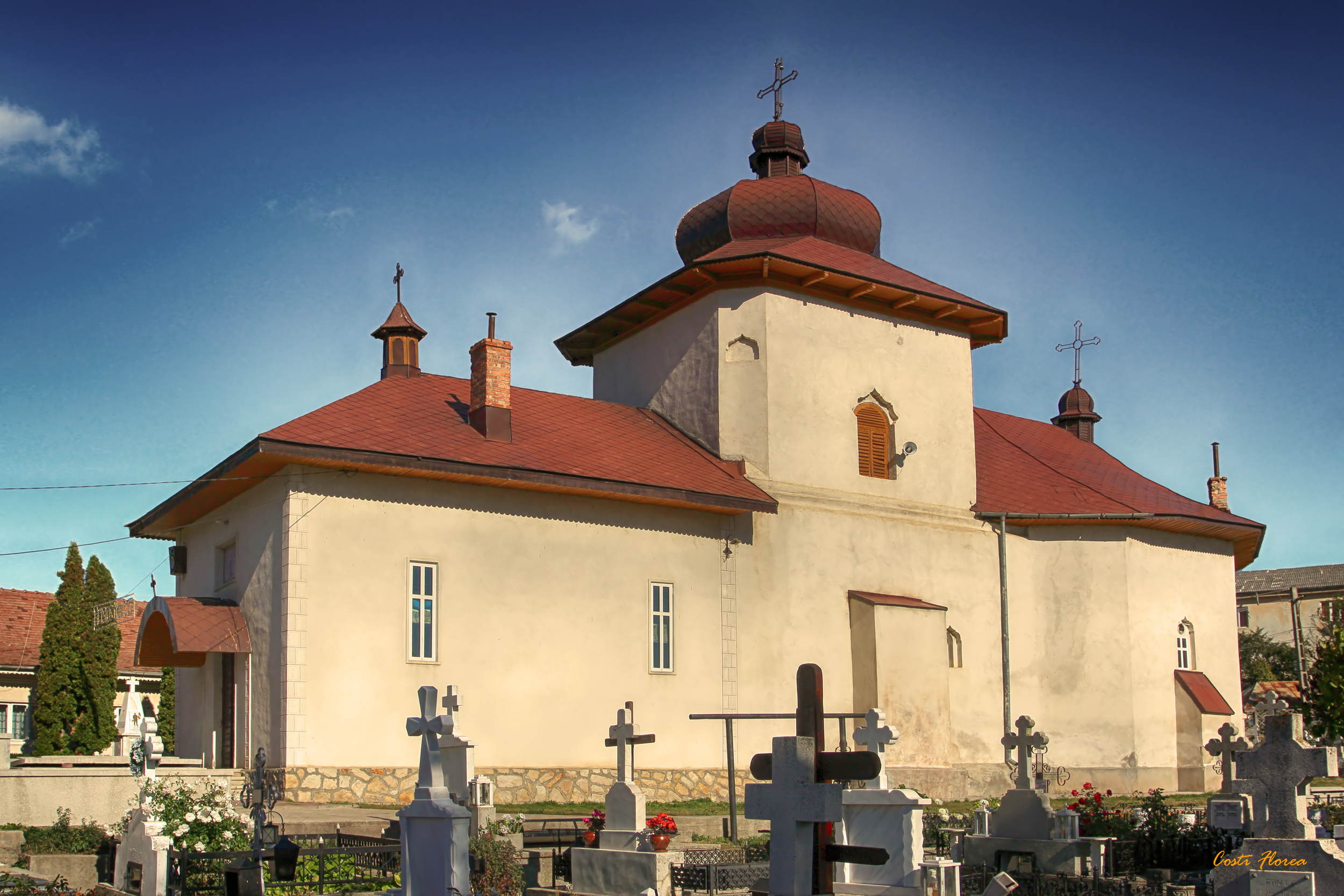 Biserica "Buna Vestire"